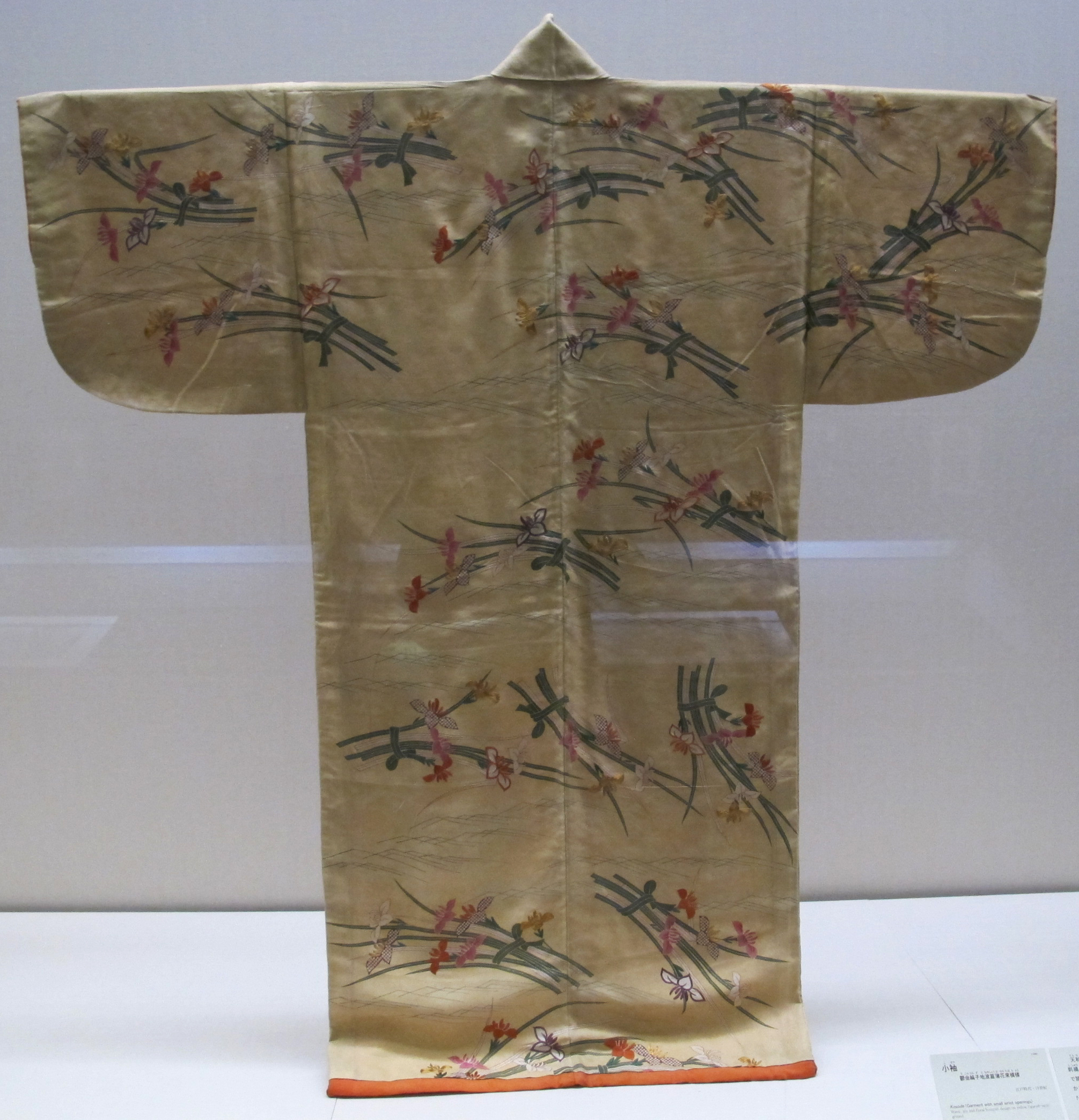 Periodo edo, kosode, XVIII sec. 3